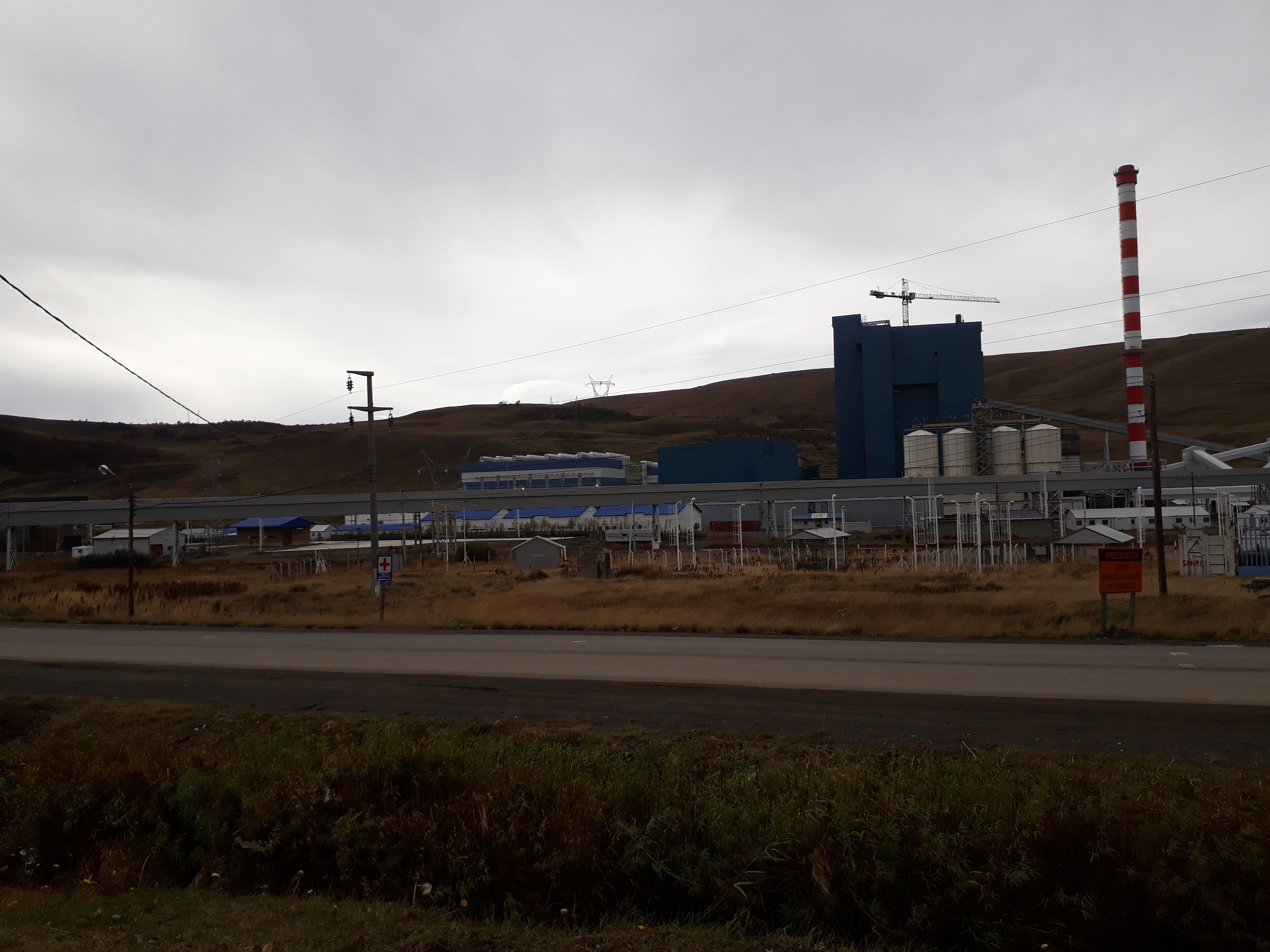 Lugar donde se encuentra la usina de Carbón de Río Turbio. Frente del pueblo de Julia Dufour.